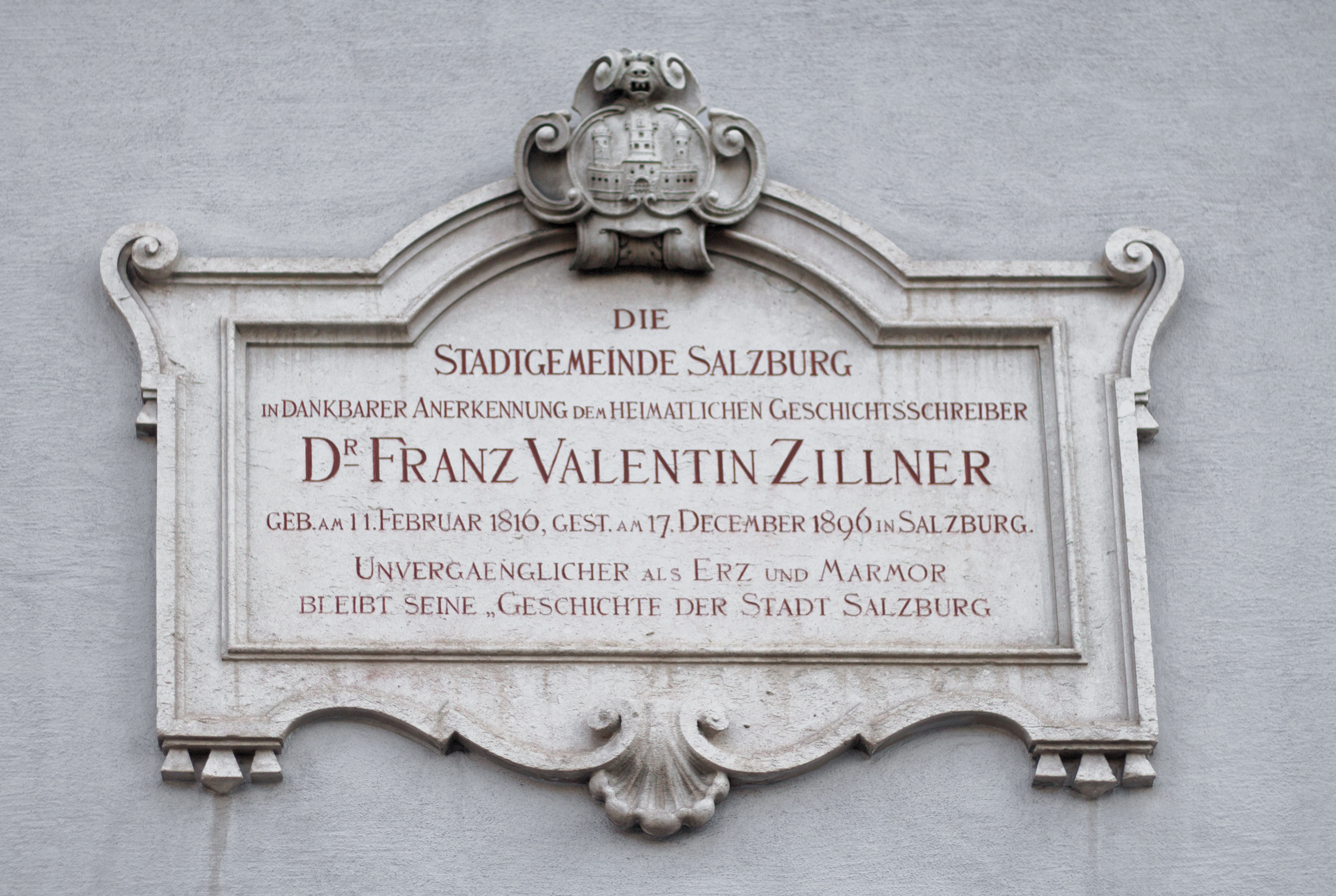 Salzburg, Rathaus: Gedenktafel an der Rudolfskai-seitigien Fassade